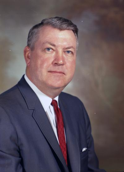 Senator William A. Gissberg, 1967